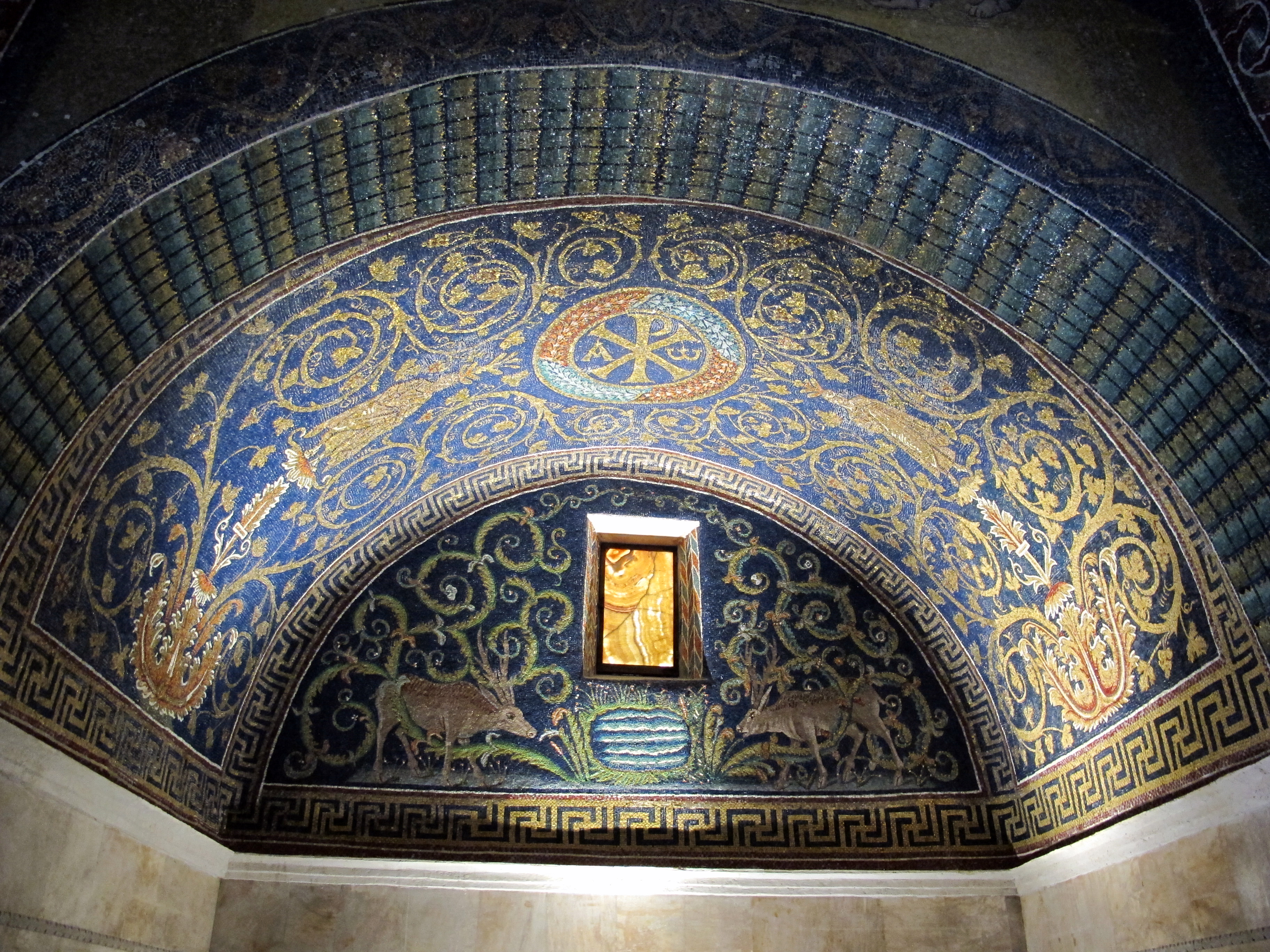 Mausoleo di Galla Placidia - MIBAC This is a photo of a monument which is part of cultural heritage of Italy.